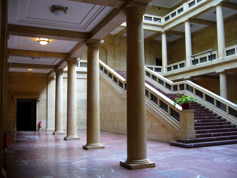 Nördlicher Lichthof des ehem. Führerbaus, heute Hochschule für Musik und Theater München